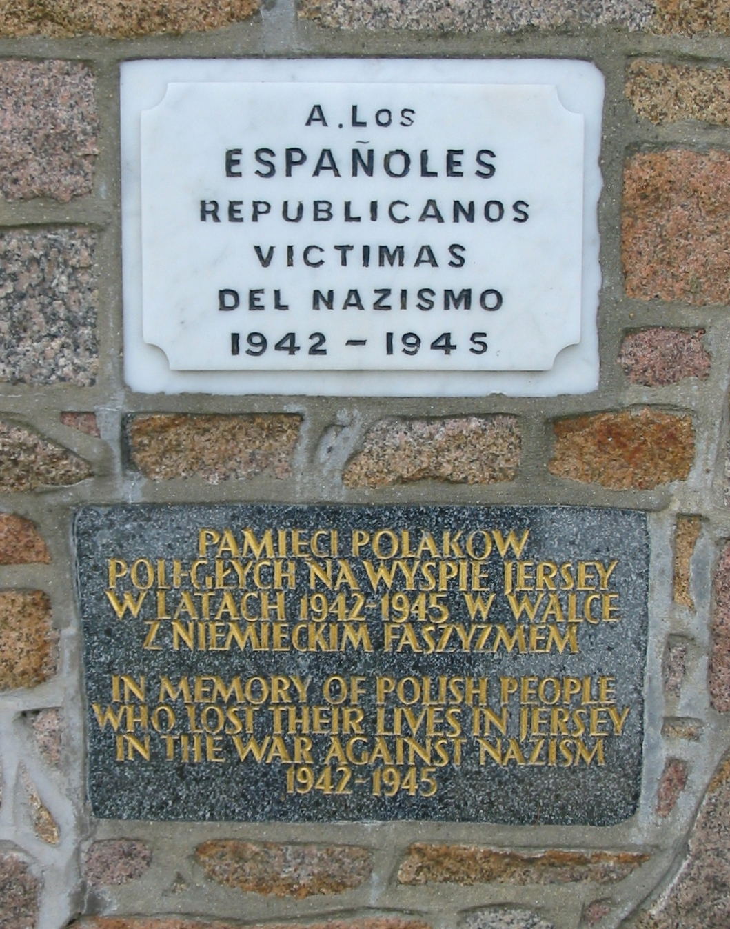 Nrf: Saint Hélyi, Jèrri, 17 dé Juîn 2009